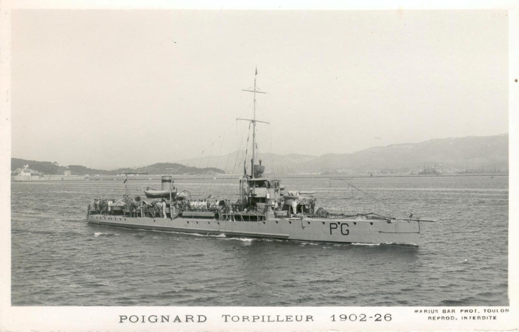 Destroyer Français Poignard de classe Branlebas (1905-1909)